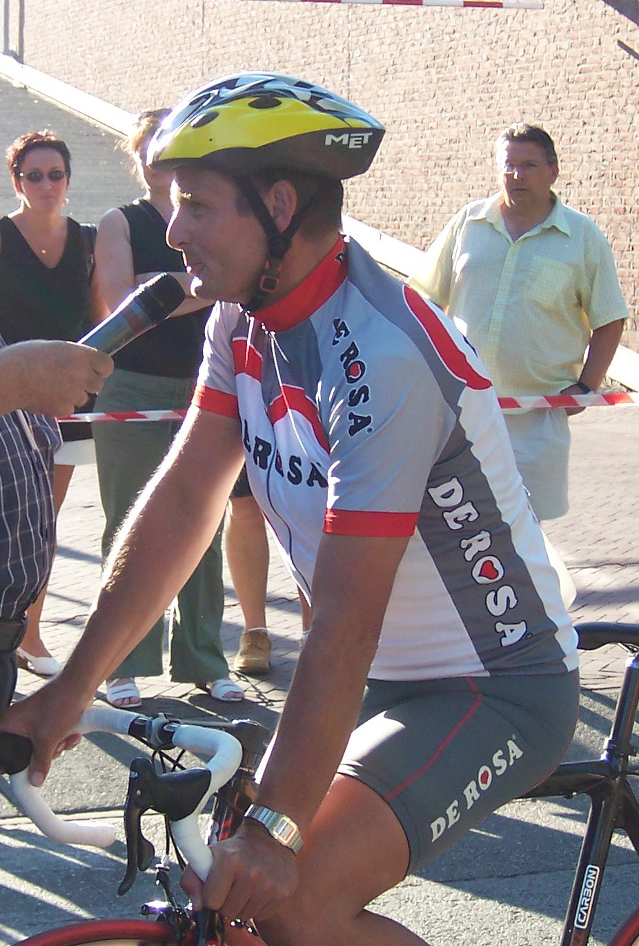 Oud-wielrenner Cees Bal tijdens een veteranenwedstrijd voorafgaand aan de Touretappe in Valkenburg LB